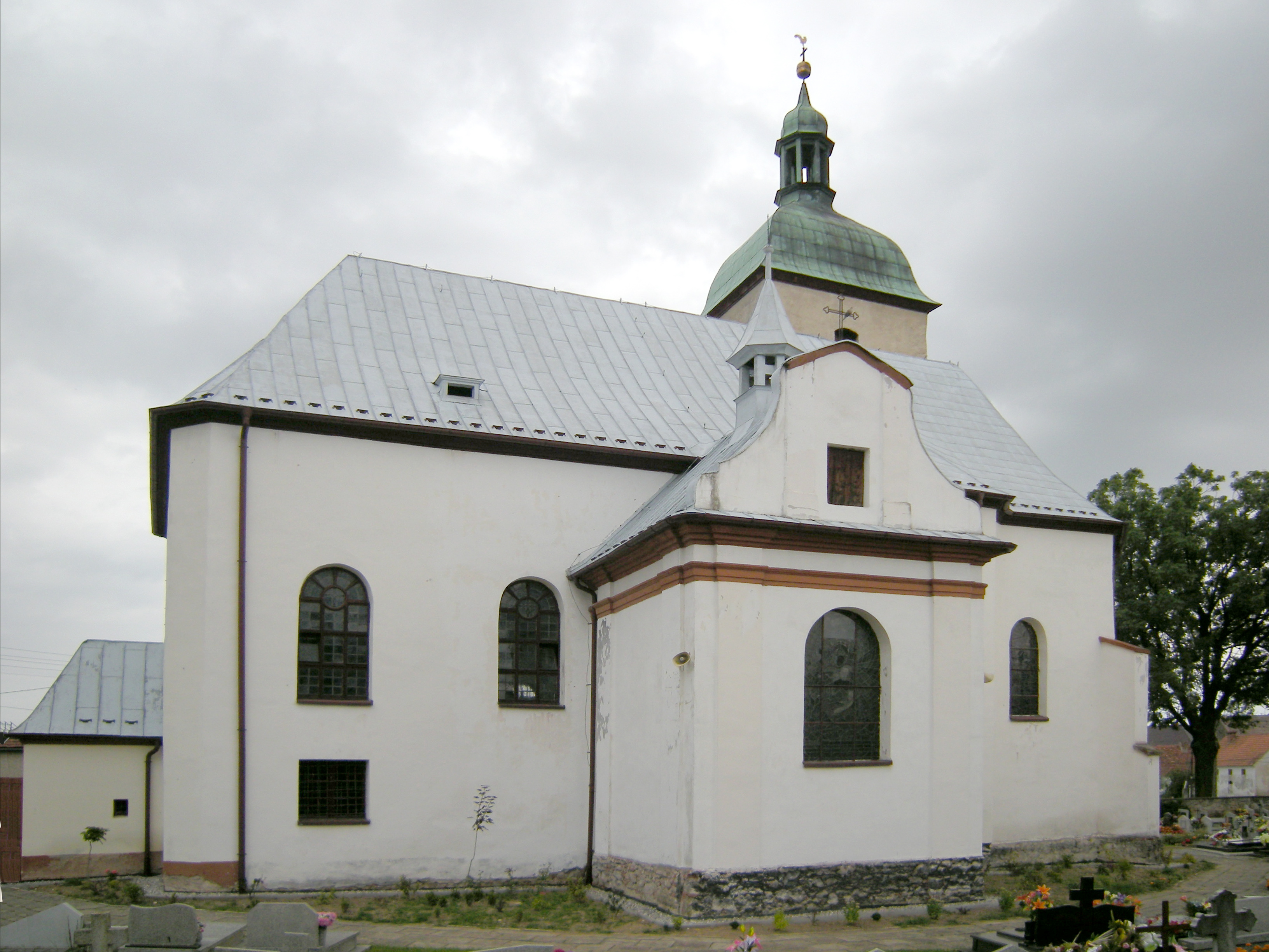 Ratnowice - rzymskokatolicki kościół parafialny p.w. św. Marcina, XVI/XVII, XX